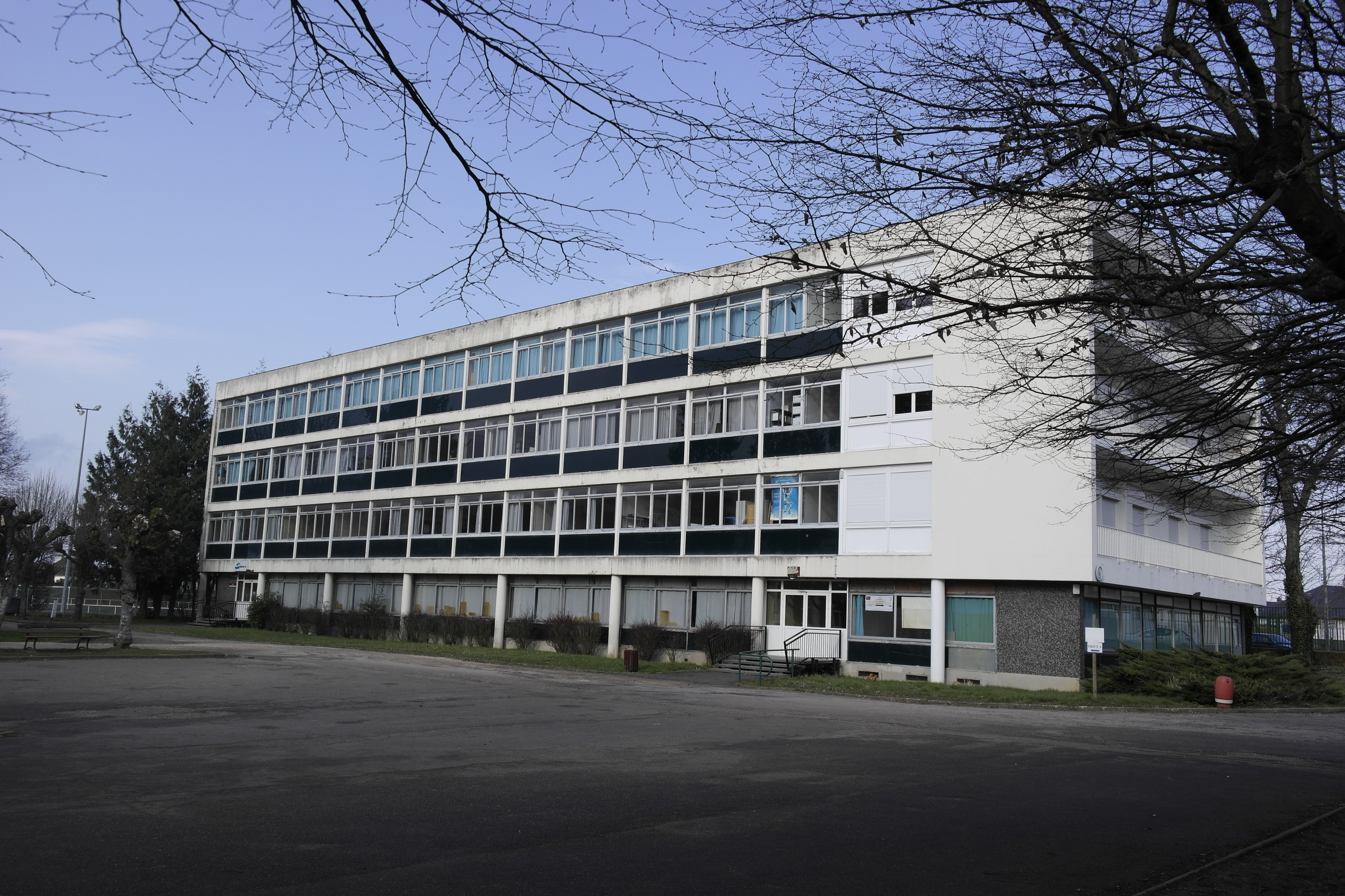 Bâtiment Papin de la cité scolaire Augustin-Thierry. Il abrite notamment le GRETA de Loir-et-Cher.